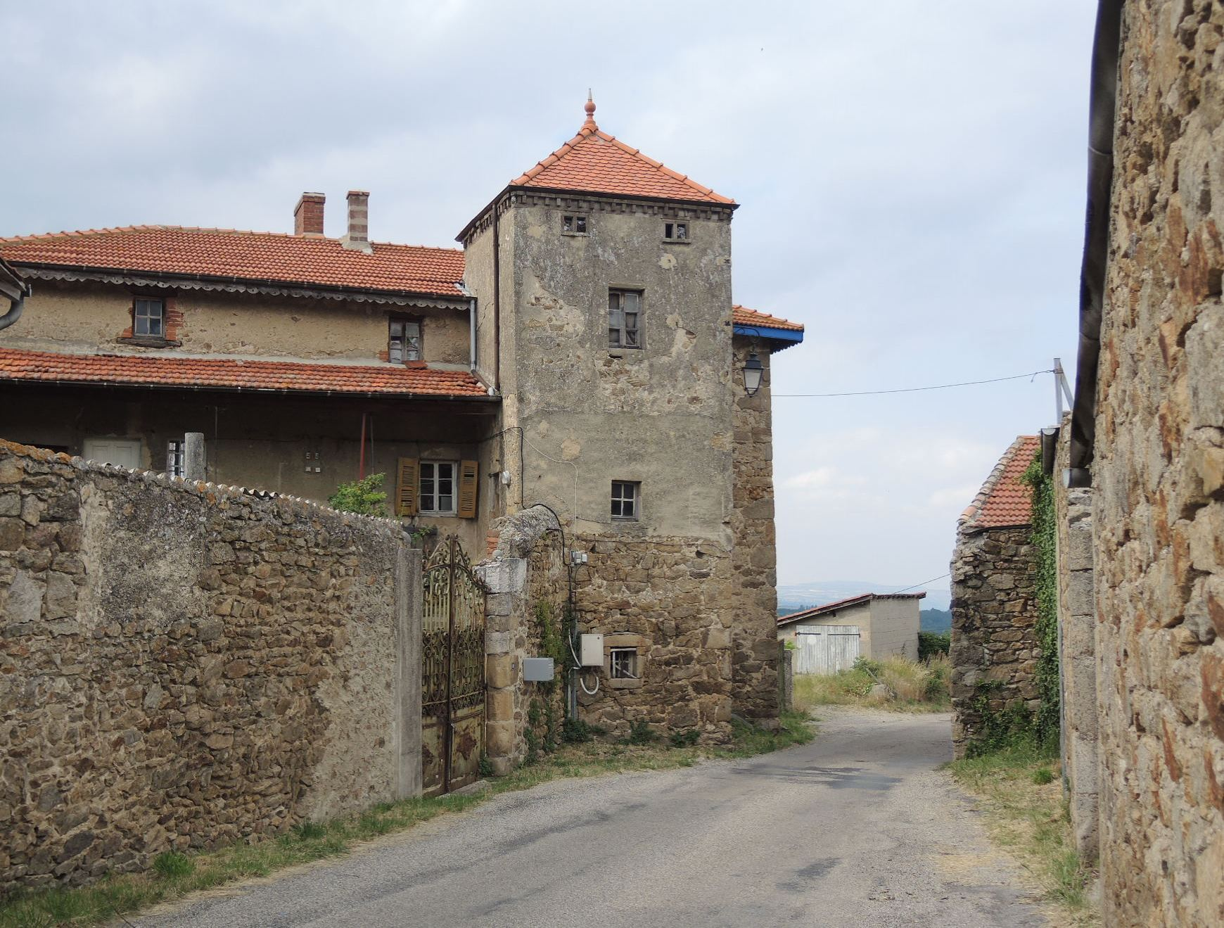 Brossainc détail